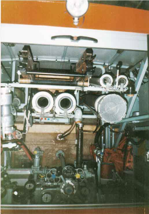 Maschinistenraum Tanklöschfahrzeug